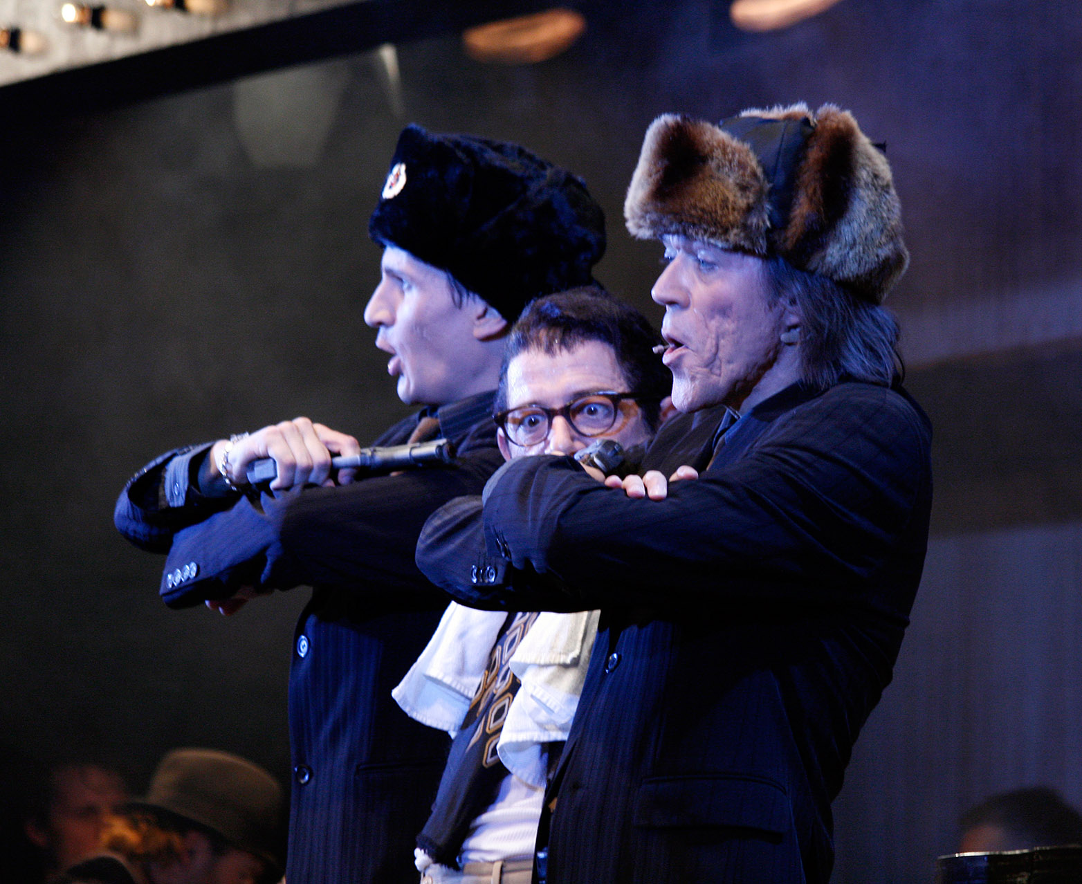 Christian Graf, Ronald Kuste und Christian Deix (v.l.n.r.) während der Premiere der zweiten Saison des Musicals Ti Amo im Metropol in Wien.